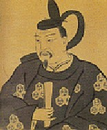 Naoe Kanetsugu 戦国武将直江兼続